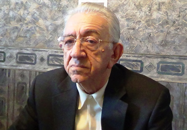 Vəfa Quluzadə